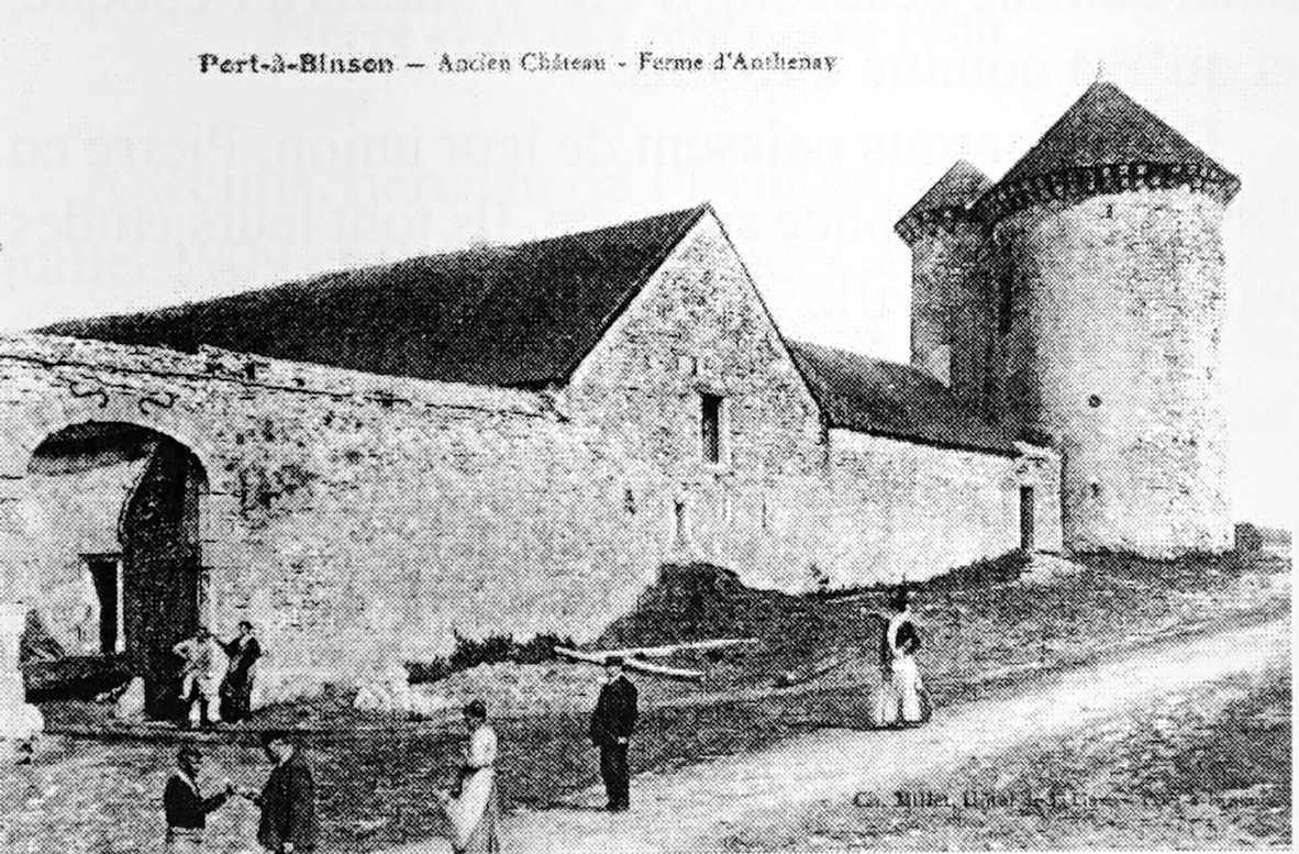 sur une vue ancienne.